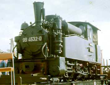 Dampflokomotive 99 4532 im Jahr 1987 im Bahnhof Erfurt West.